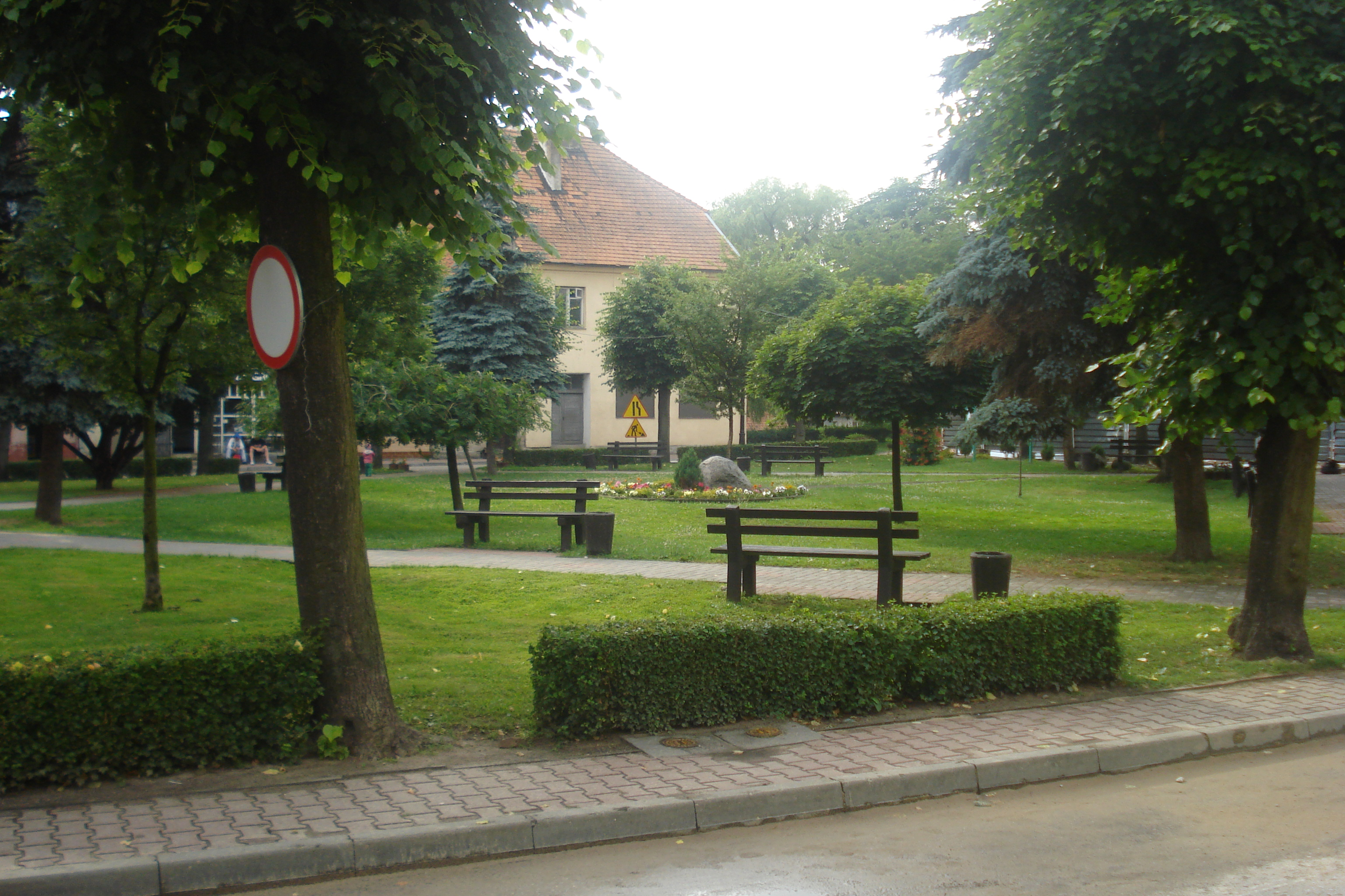 Barczewo: Park przy Ratuszu